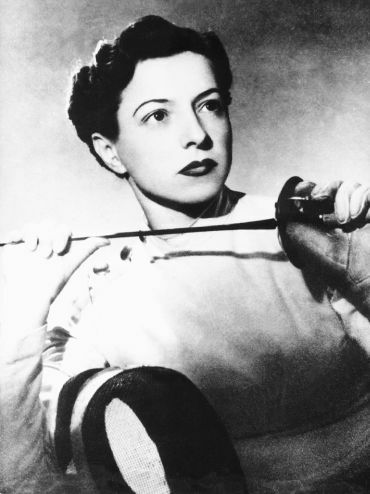 Elek Ilona magyar olimpiai bajnok vívó